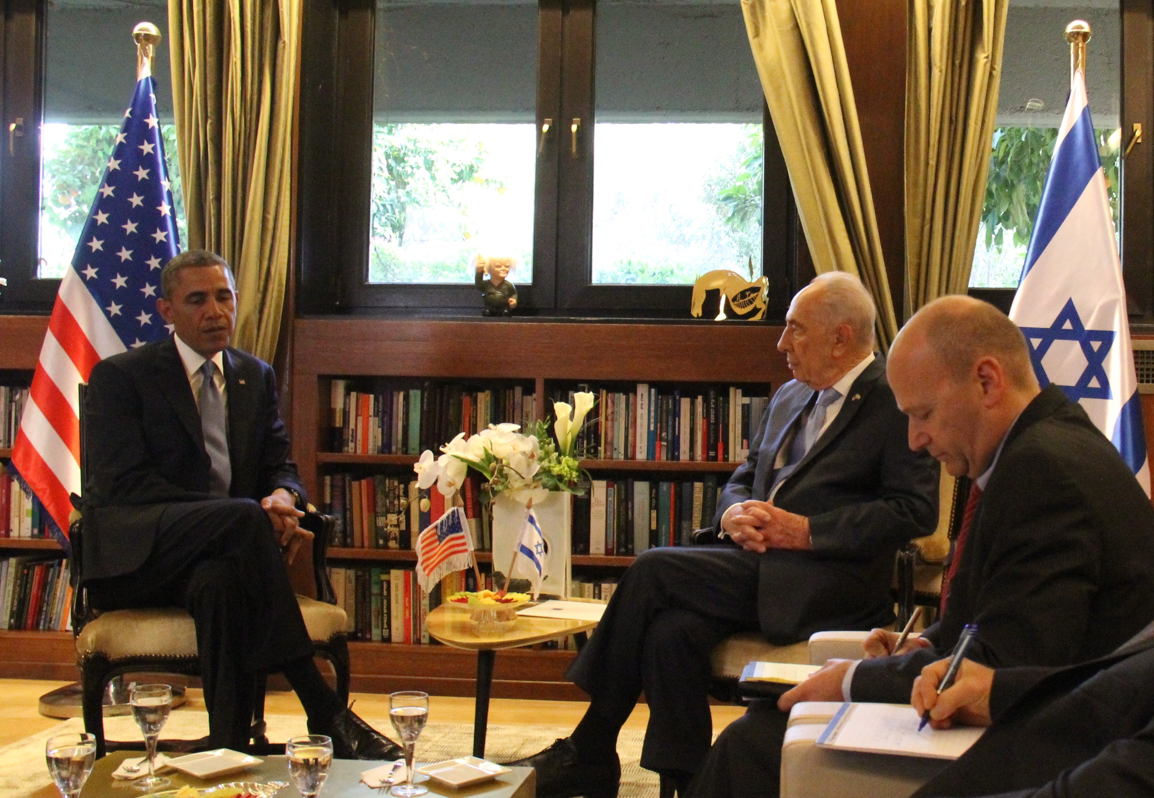 נדב תמיר עם הנשיא שמעון פרס בפגישה עם נשיא ארצות הברית, ברק אובמה